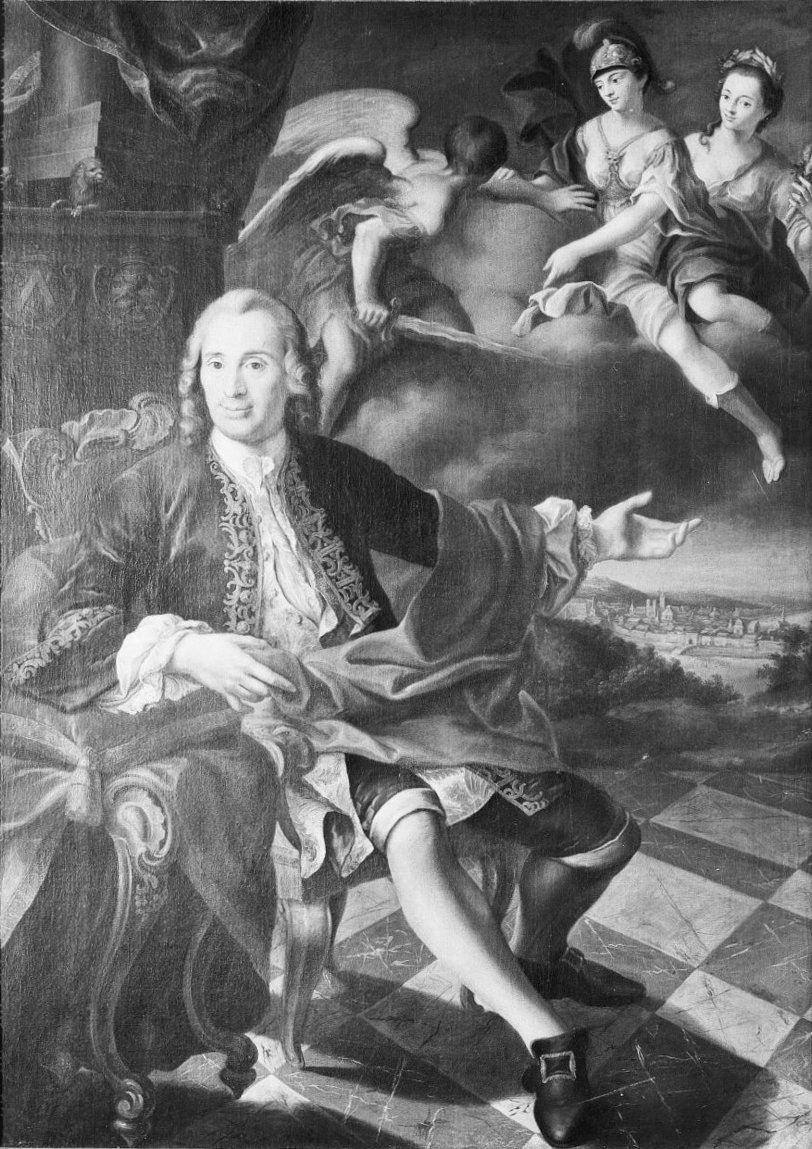 Kasteel Neubourg: portret van Léonard Bernard de Hayme, heer van Gulpen 1769-1795.